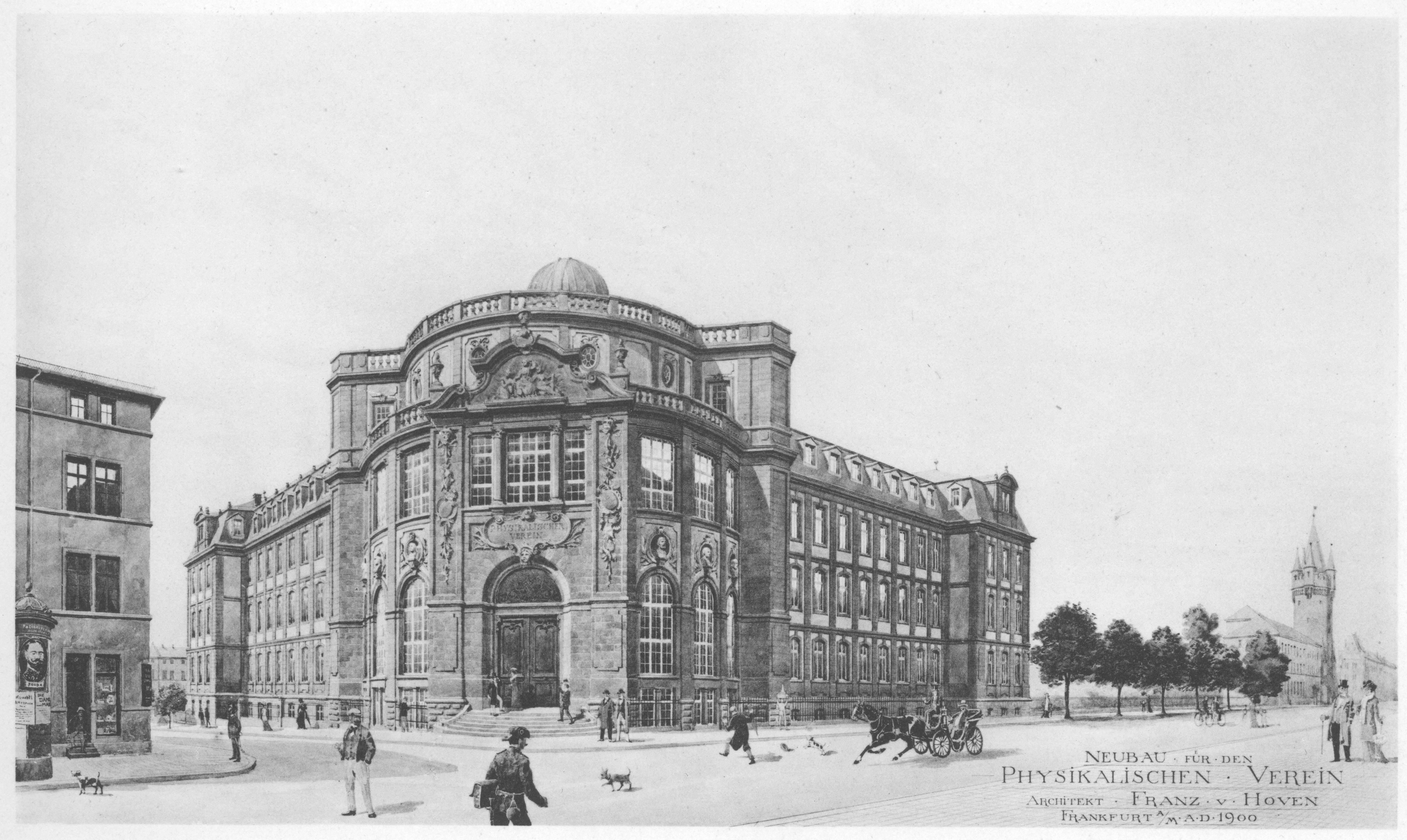 Zeichnung des Gebäudes des Physikalischen Vereins von Franz von Hoven, Ecke Bleichstraße/Brönnerstraße, wurde nie umgesetzt, da der Physikalische Verein ein anderes Grundstück zur Verfügung gestellt bekam.